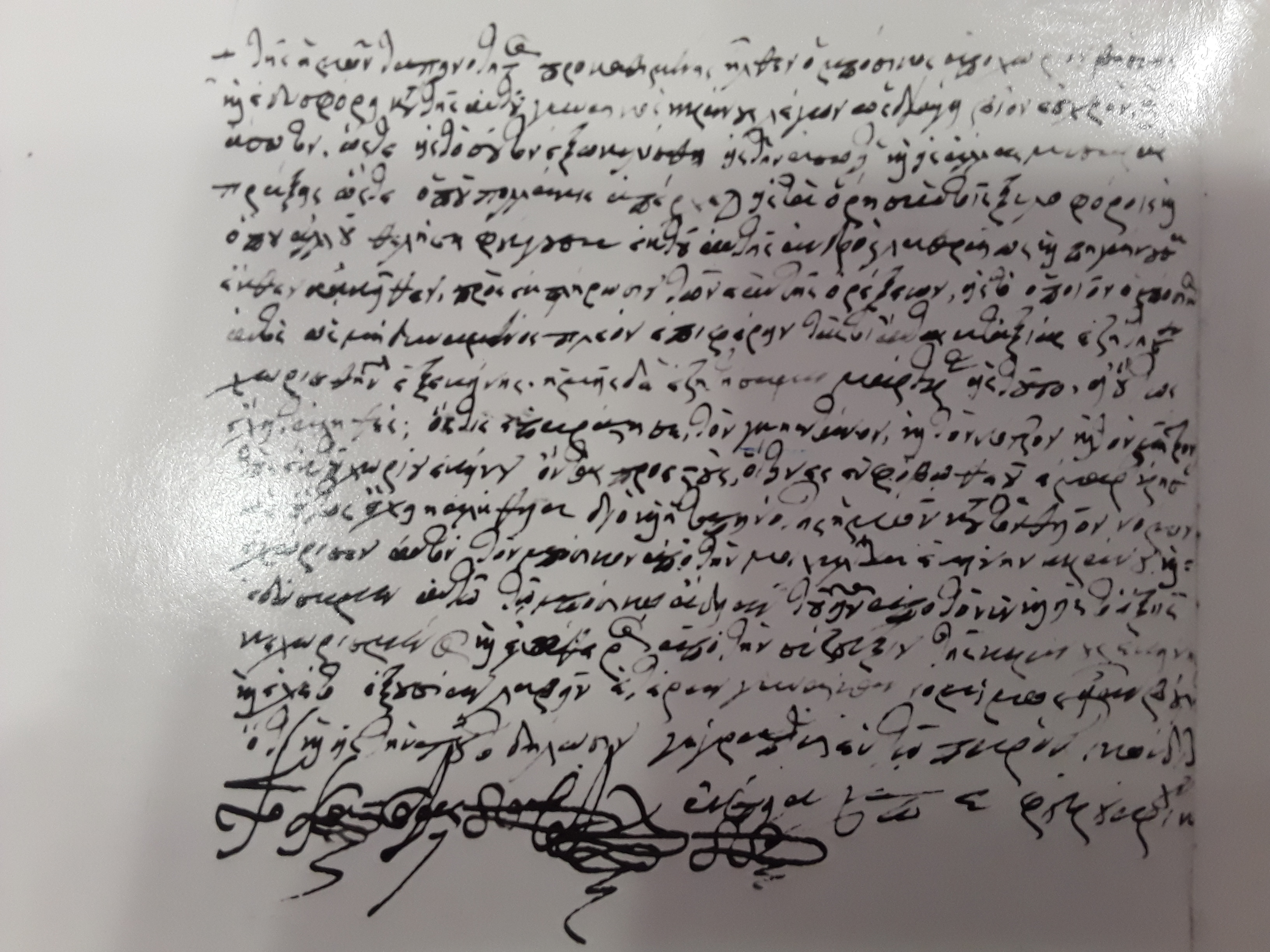 Το πάνω μέρος της σελίδας 27 του Κώδικα ΕΒΕ 2753 στην οποία υπάρχει το διαζύγιο του Μπόσικου από το φωτοαντίγραφο του Κώδικα που βρίσκεται στην Δημοτική Βιβλιοθήκη Καστοριάς.